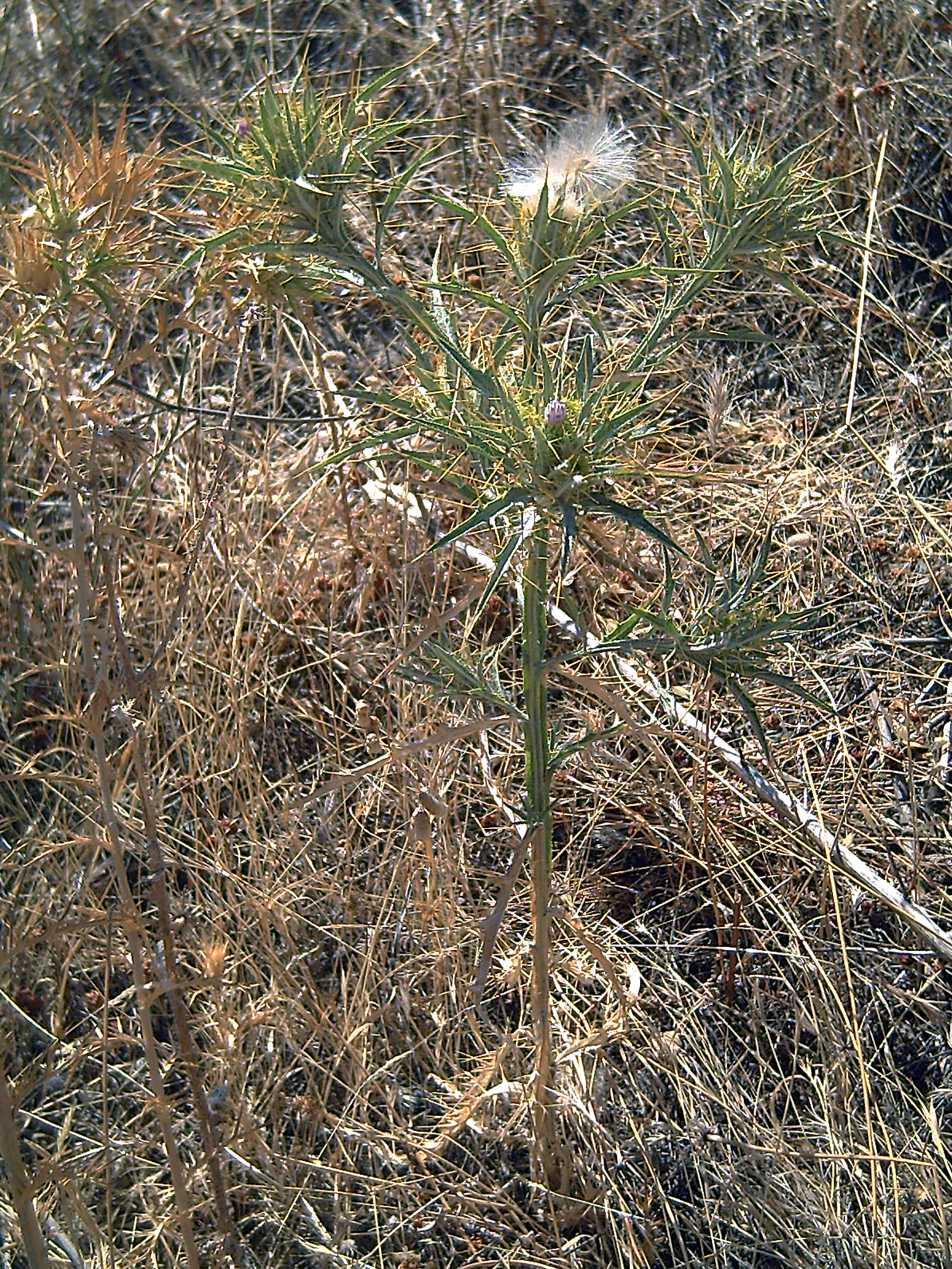 Picnomon acarna plant Campo de Calatrava, Spain